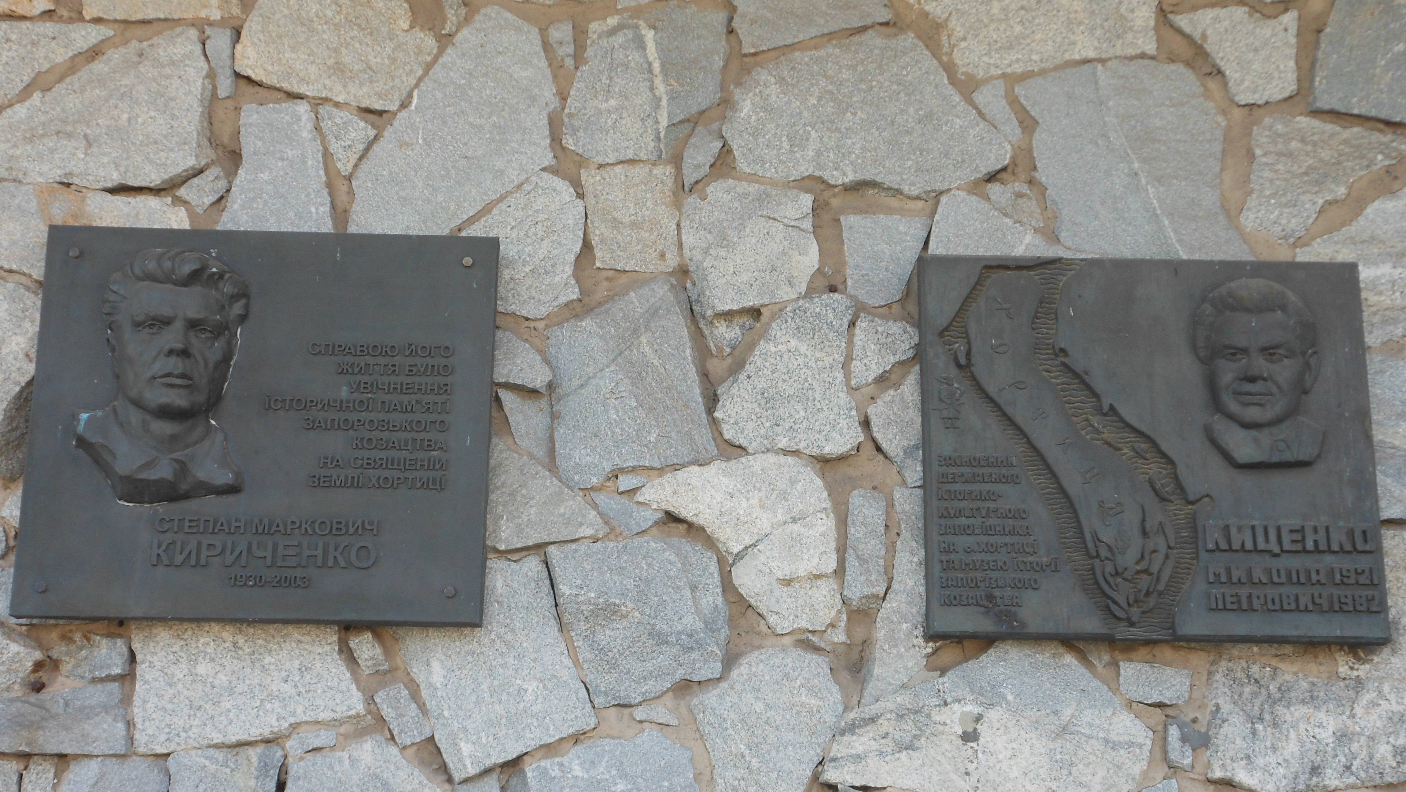 Національний заповідник «Хортиця», Запоріжжя, острів Хортиця